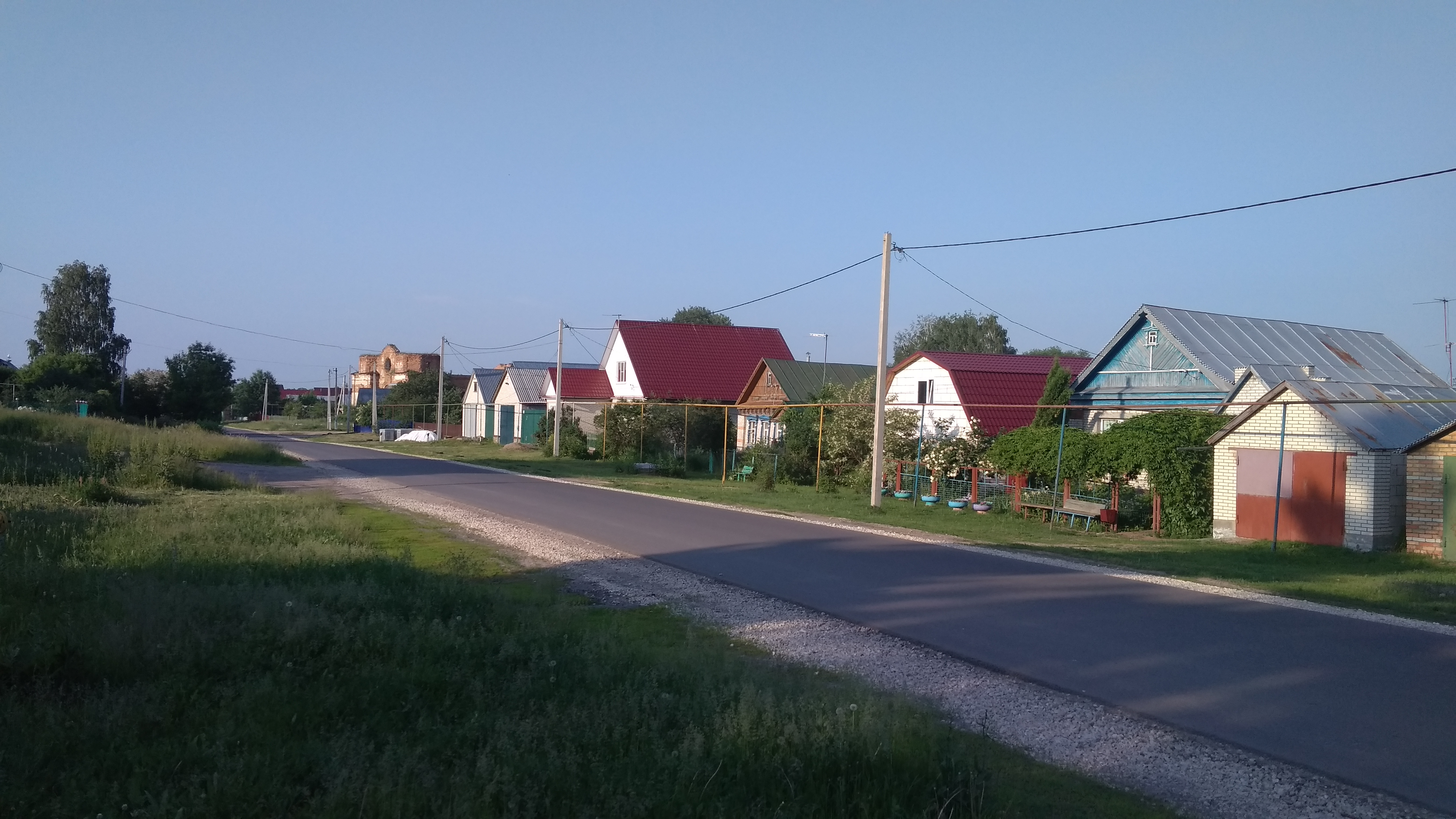 Улица Кузнецова с. Чемодановка Бессоновского района Пензенской области